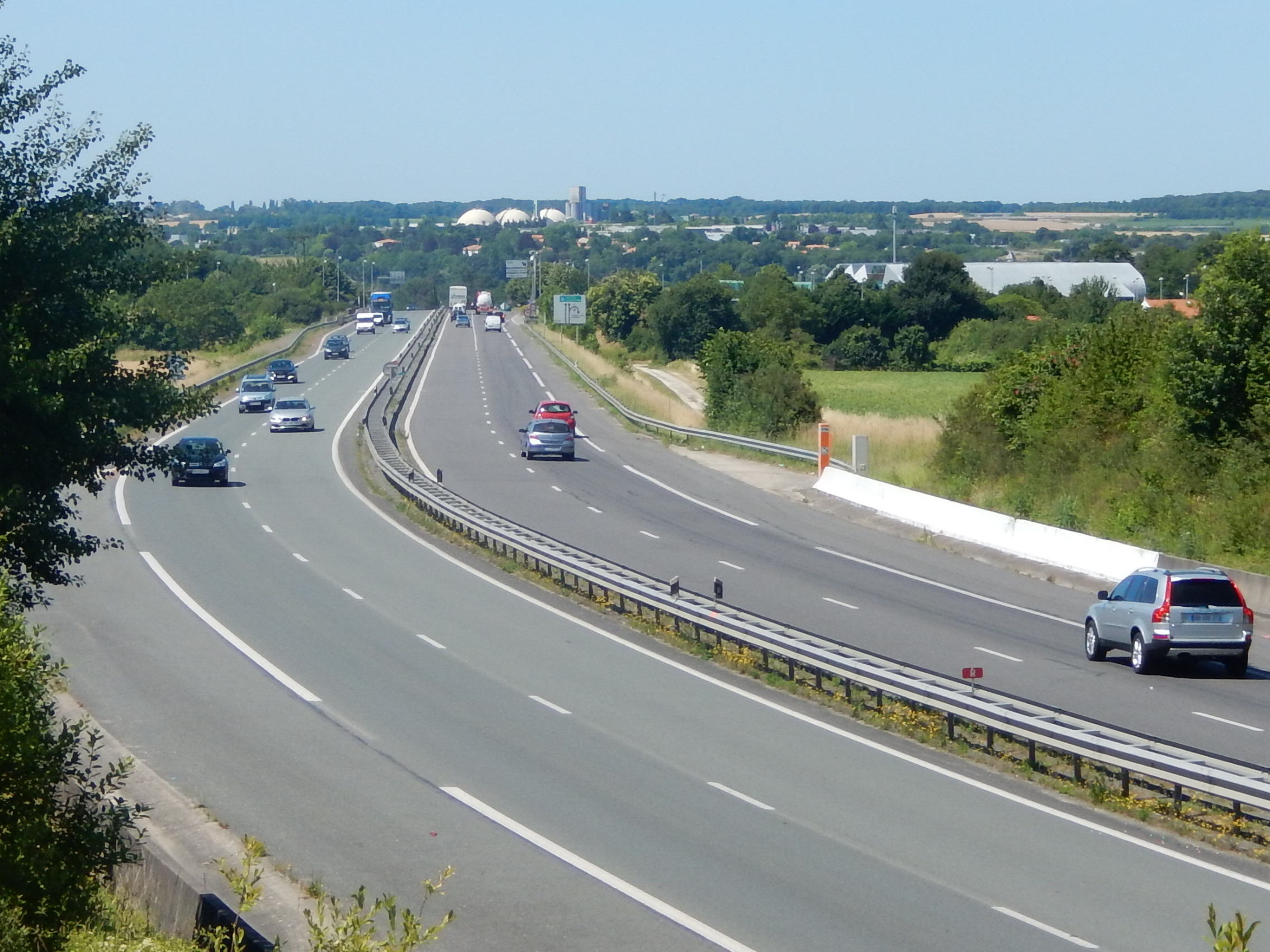 La route nationale 141 contournant Saintes par le sud-est. Cette section de la rocade de Saintes se distingue par son agencement à deux fois deux voies. La photo a été prise depuis un chemin situé près du pont de la rue de Lamothe ; on aperçoit au loin la sortie qui permet de rejoindre la route départementale 24.